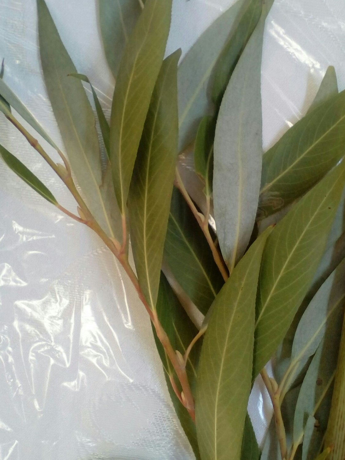 שני ענפי ערבה.